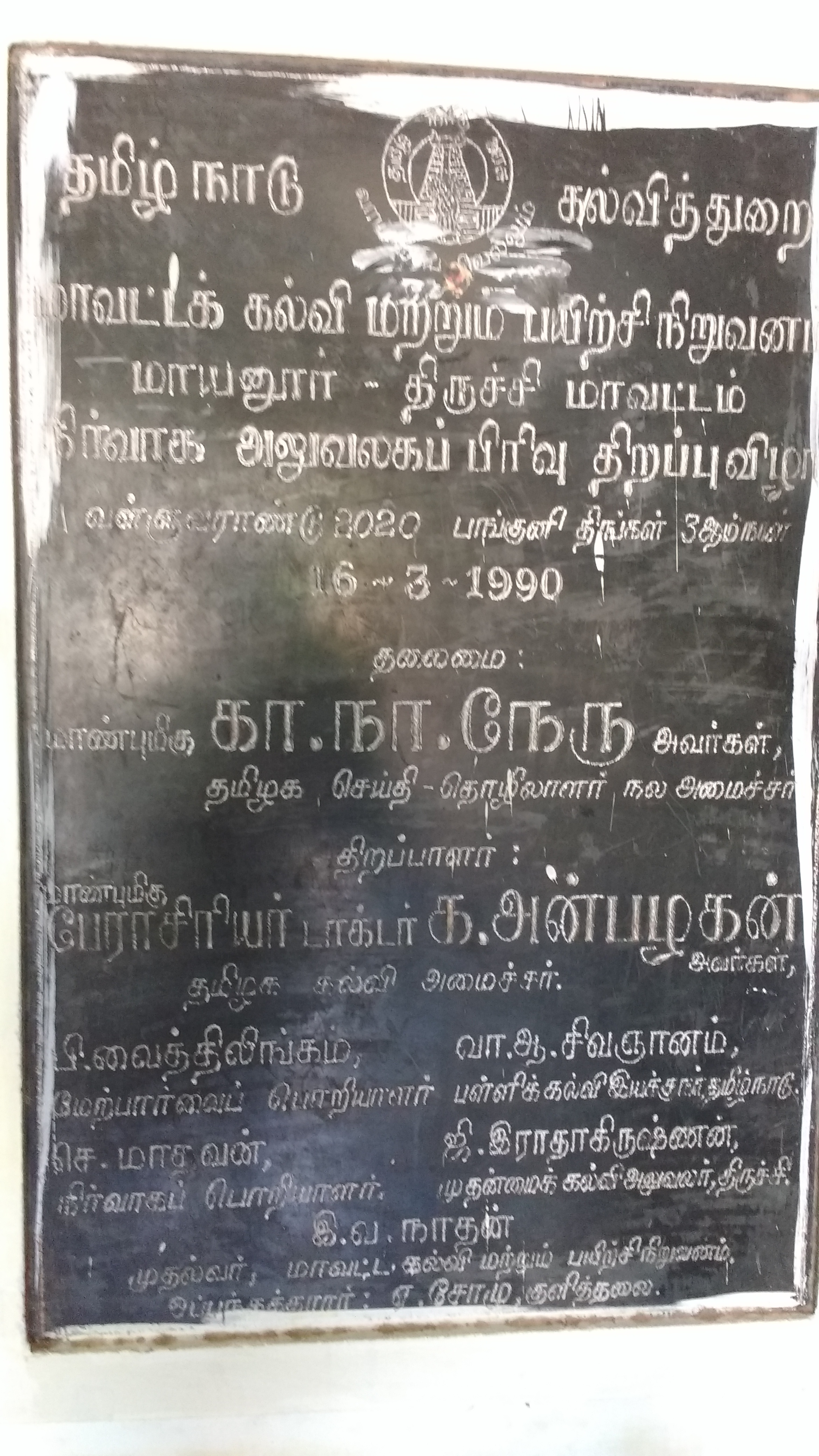 மாயனூர் மாவட்ட ஆசிரியர் கல்வி மற்றும் பயிற்சி நிறுவன கட்டிடத் திறப்பு விழா கல்வெட்டு